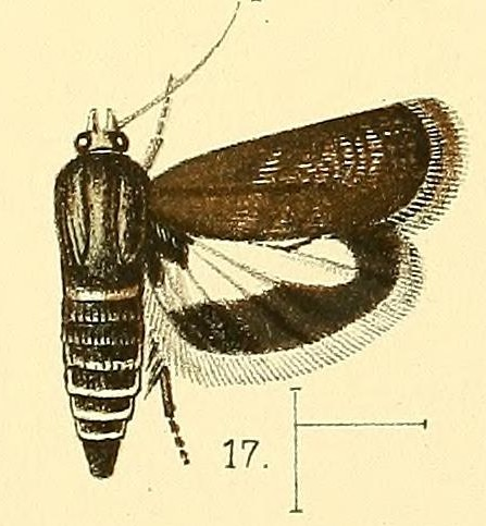 Atractoceros albiciliata